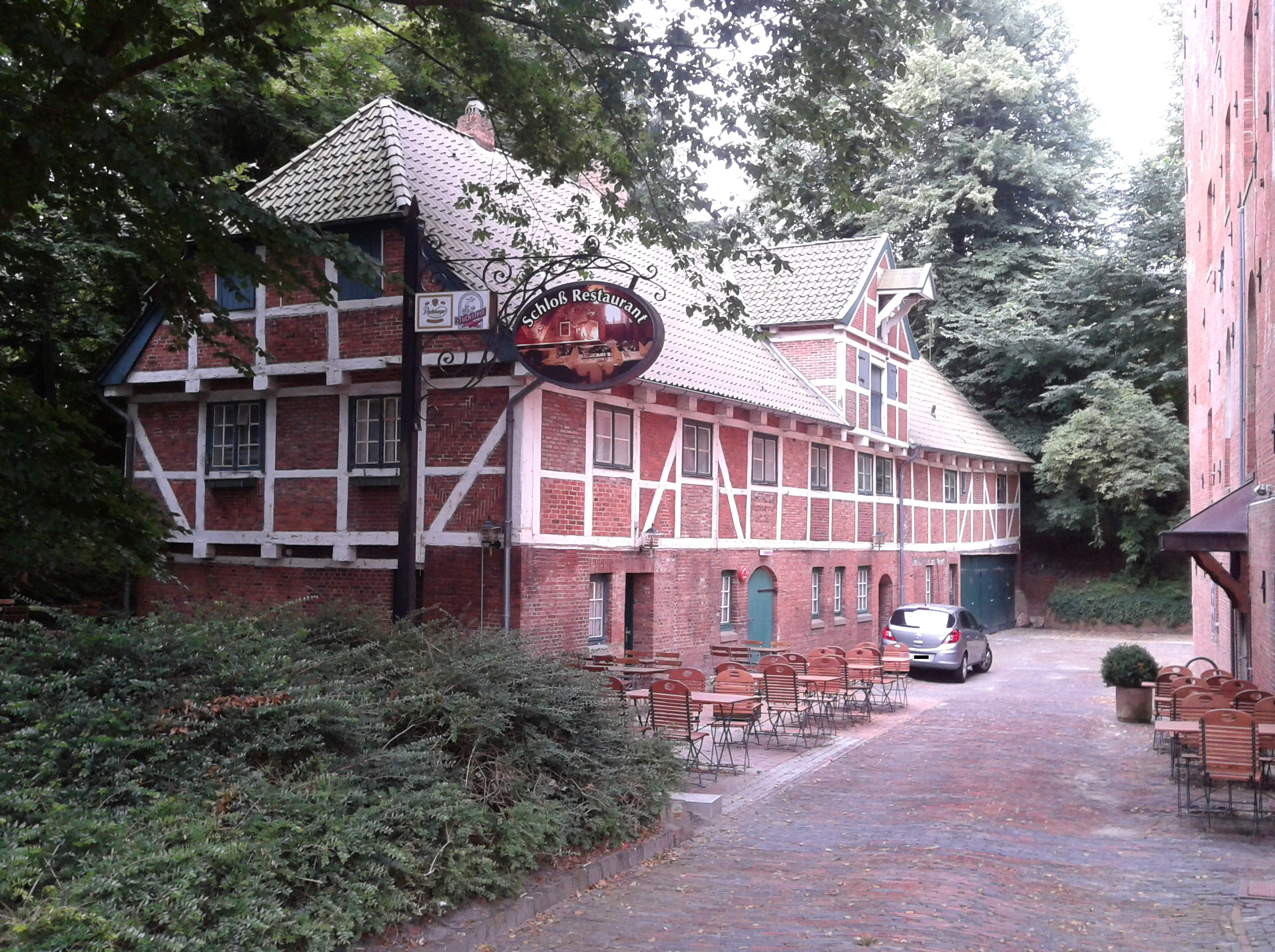 Schloss Ritzebüttel in Cuxhaven (Germany)